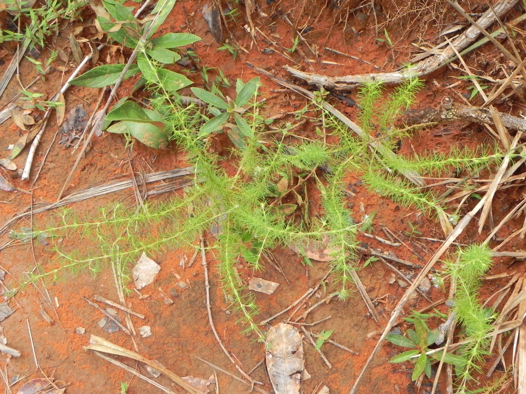 Psyllocarpus phyllocephalus K.Schum. - RUBIACEAE - Espécie endêmica de Goiás e Distrito Federal - Jardim Botânico de Brasília - Brasília - Distrito Federal - Brasil.